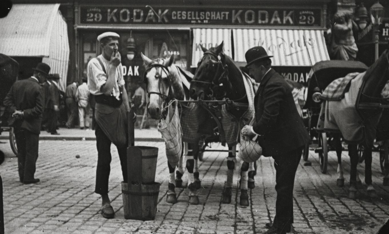 Fiaker und Wasserer vor dem Kodak-Geschäft Graben 29, Wien